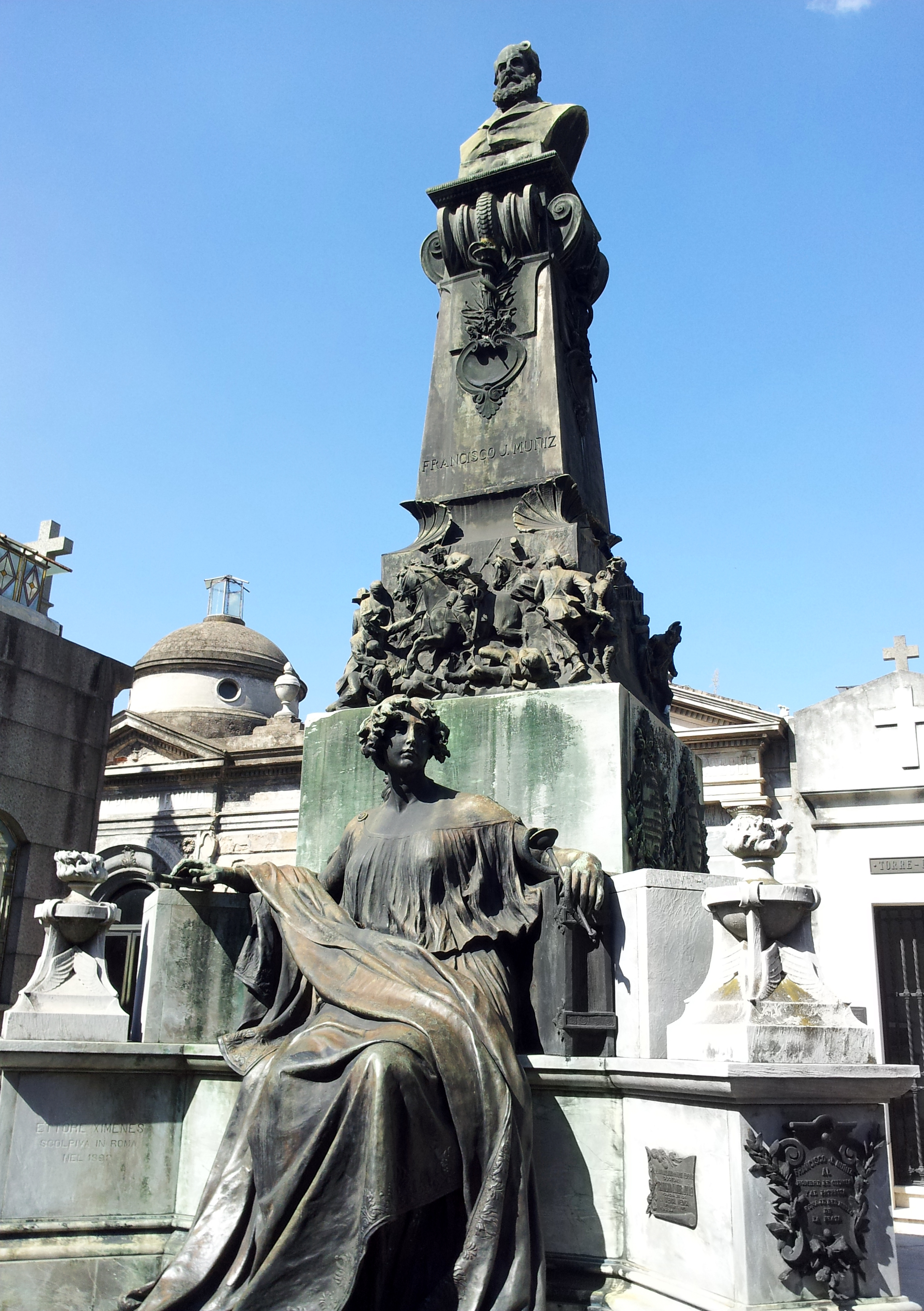 Sepulcro de Francisco Javier Muñiz